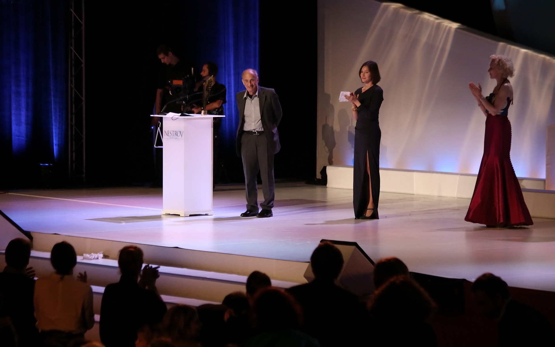 Luc Bondy, Laudatorin Johanna Wokalek und Moderatorin Sunnyi Melles - Nestroy-Theaterpreis 2013 in der Halle F der Wiener Stadthalle (Wien, Österreich).